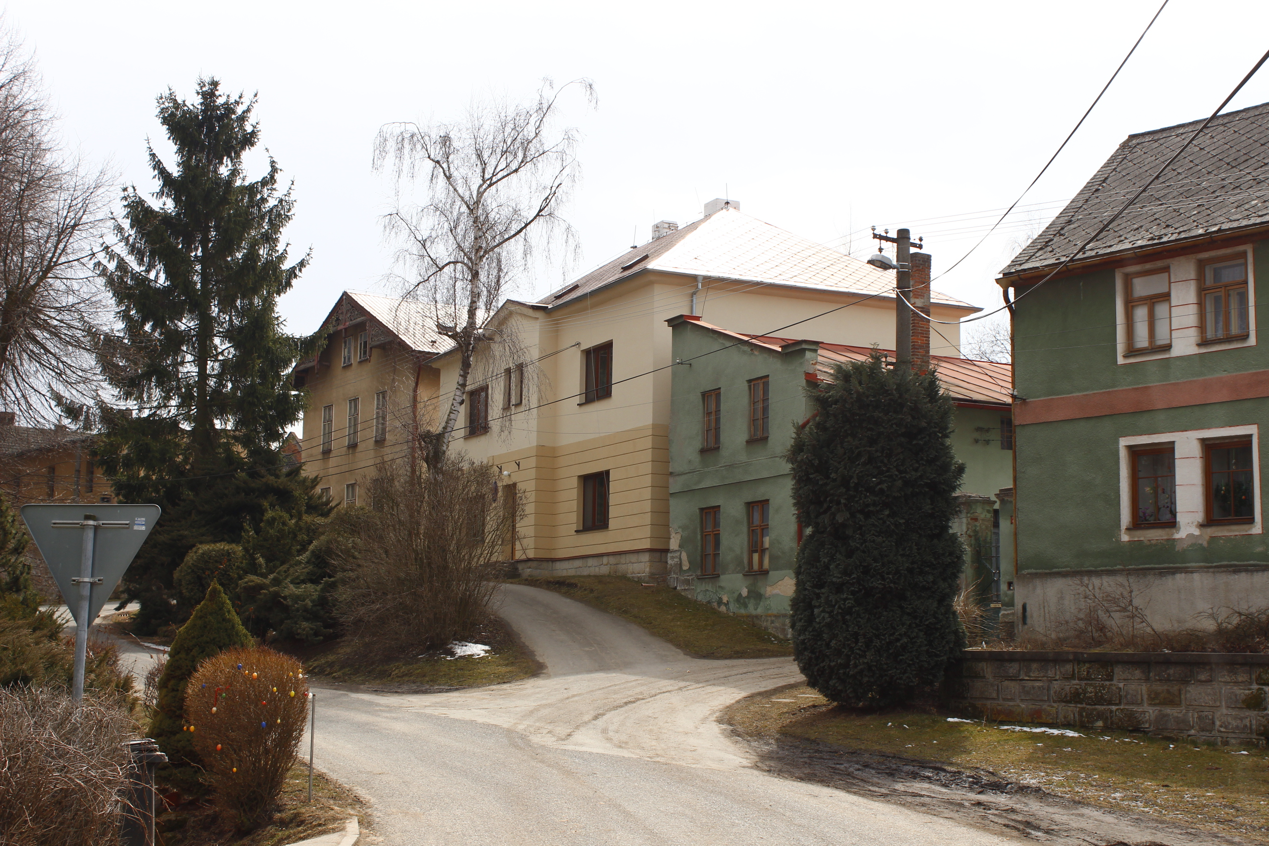 Obecní úřad v domě číslo popisné 23 v Krásné Vsi na Mladoboleslavsku.